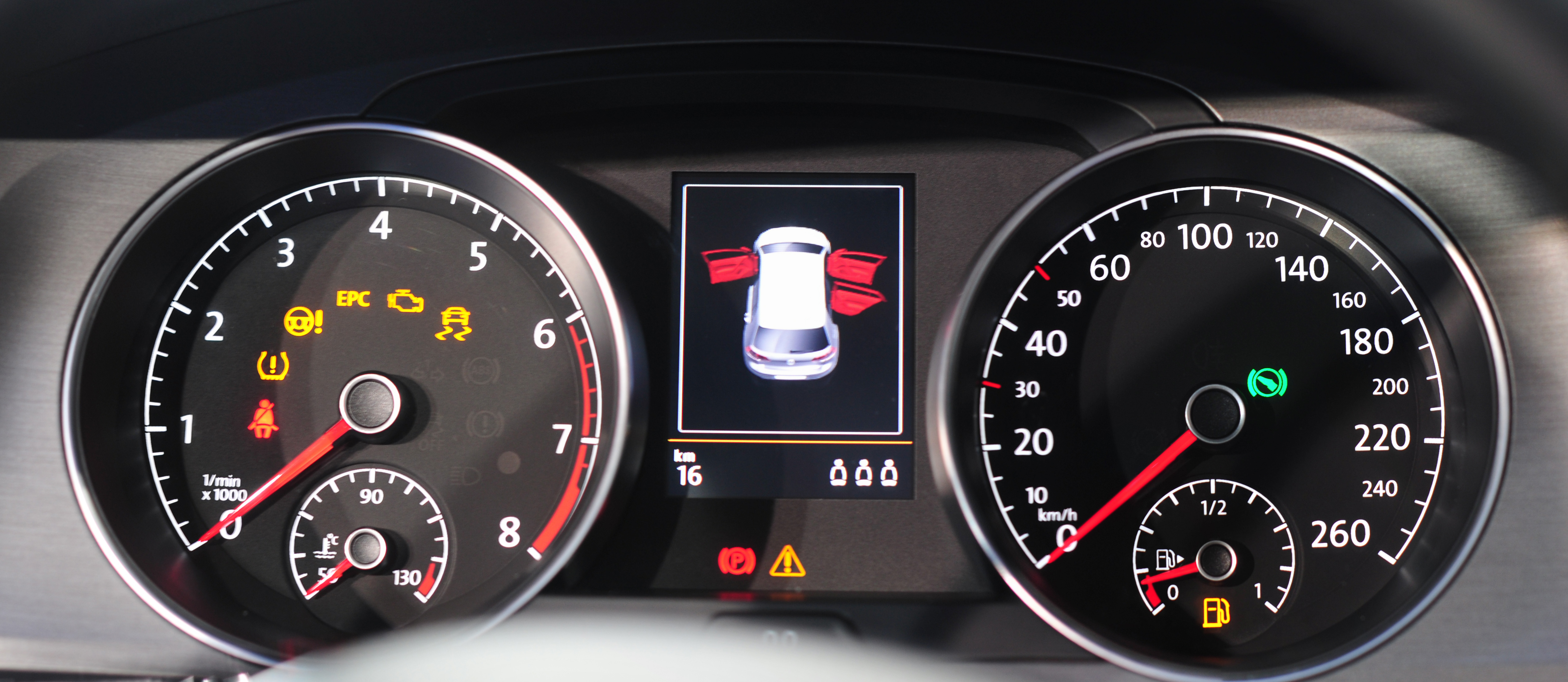 Autostadt Wolfsburg, Golf VII